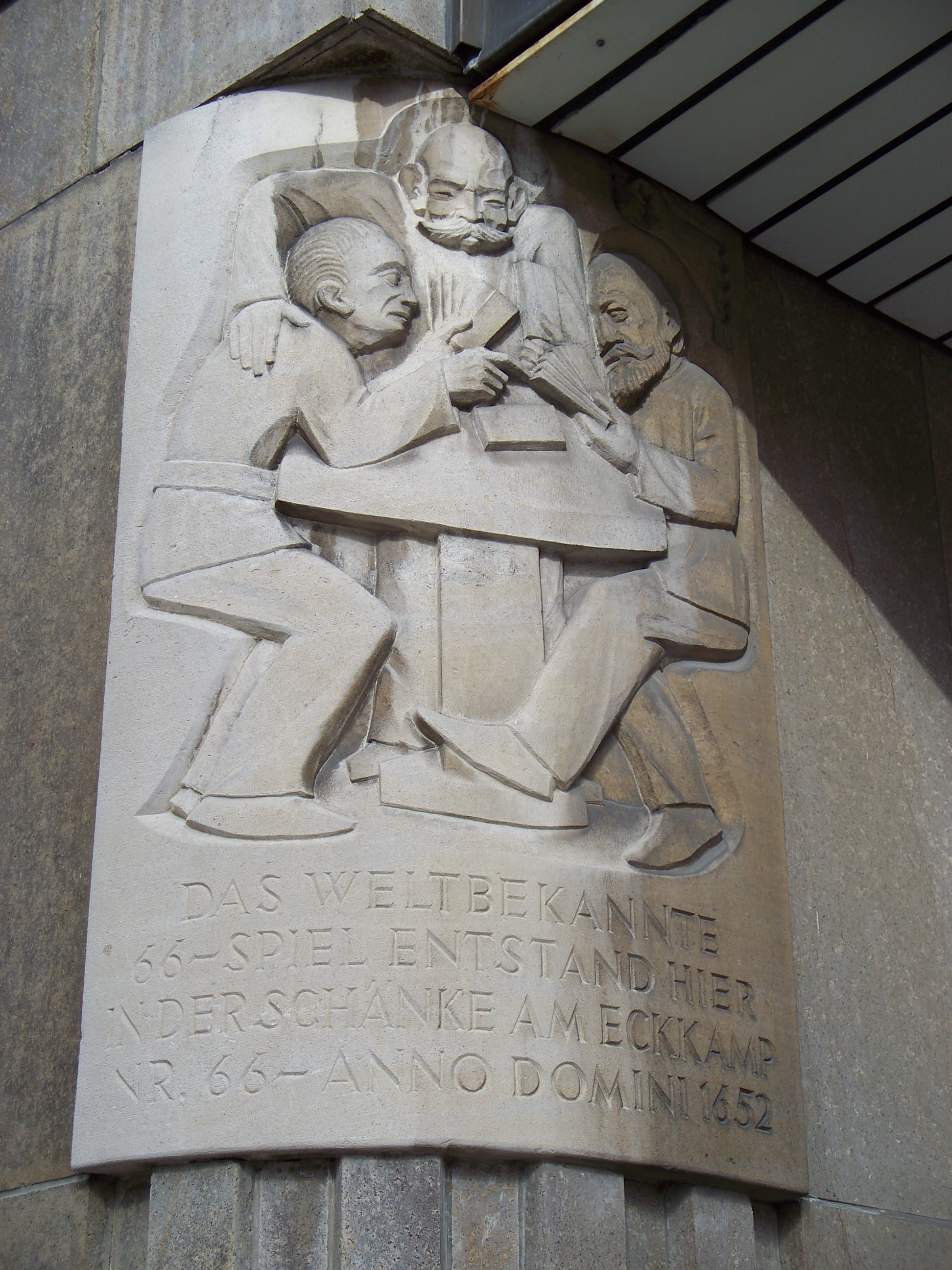 Bild einer Gedenktafel am Kamp 17 für das Spiel Sechsundsechzig